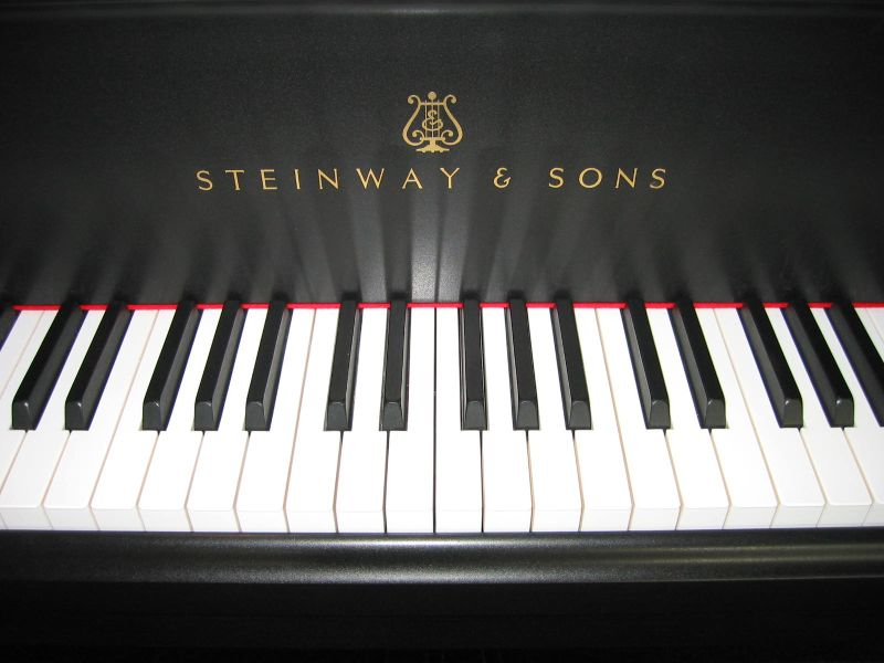 Steinway Schriftzug Steinway Lettering